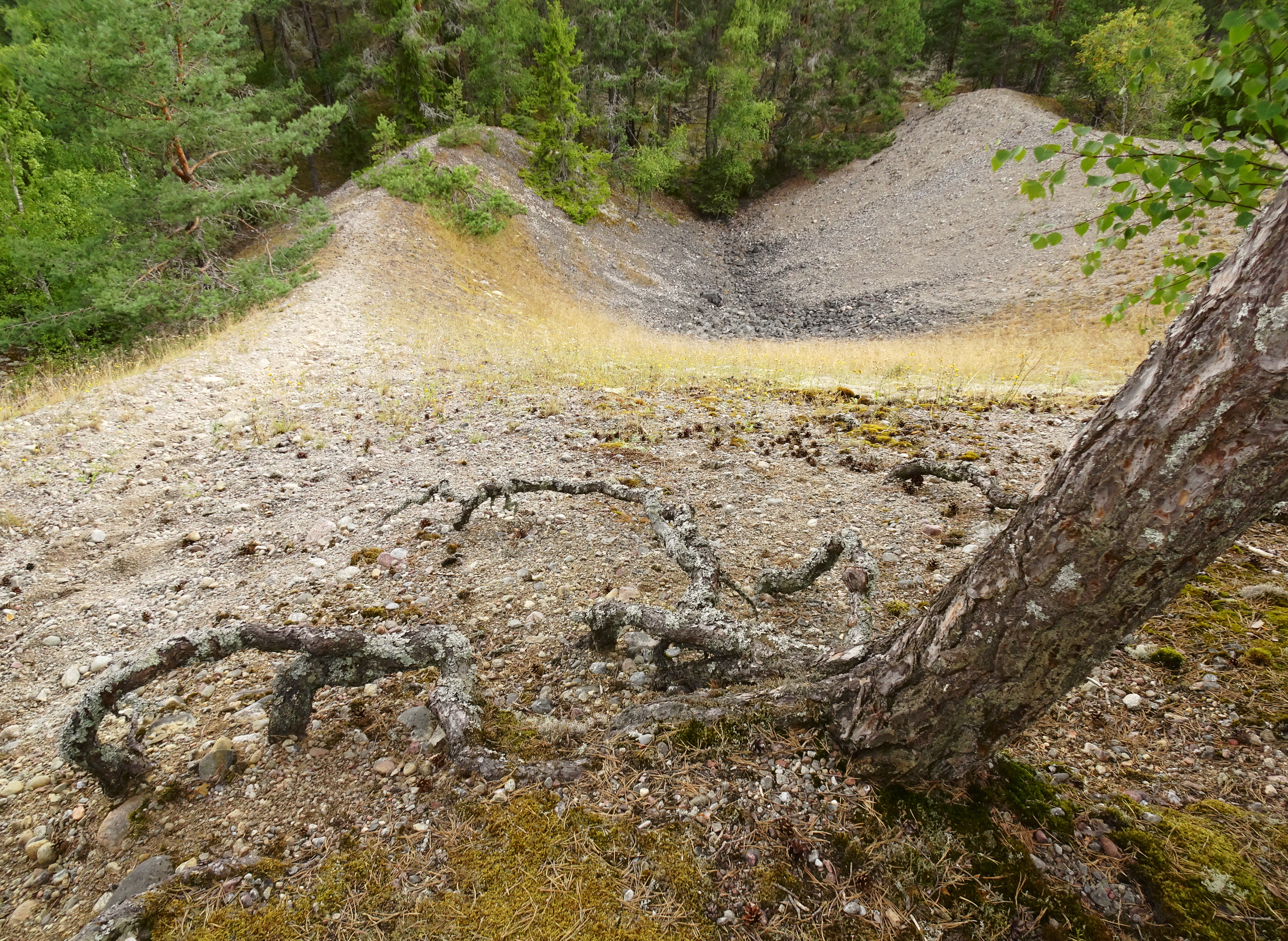 Ön Malmhuvud, grustag